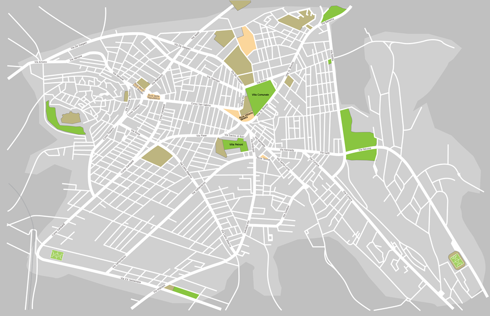 Mappa di Canosa di Puglia, 2007